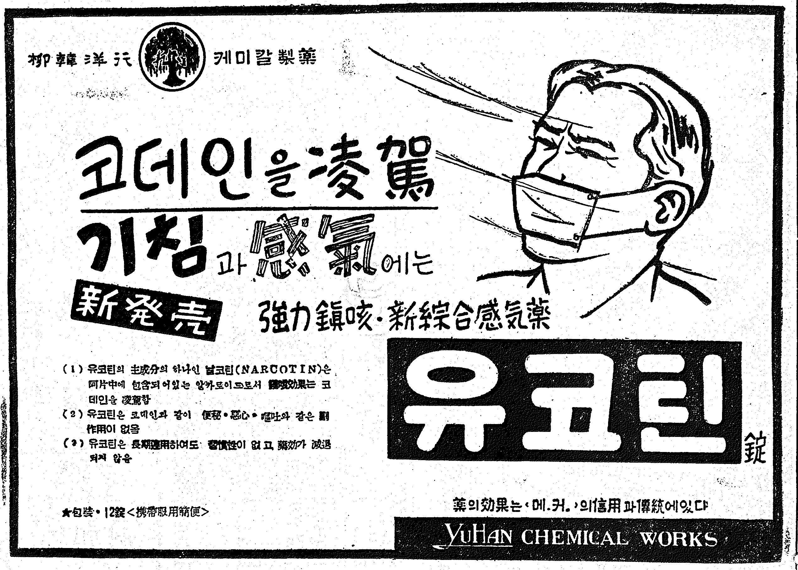 유한양행 광고